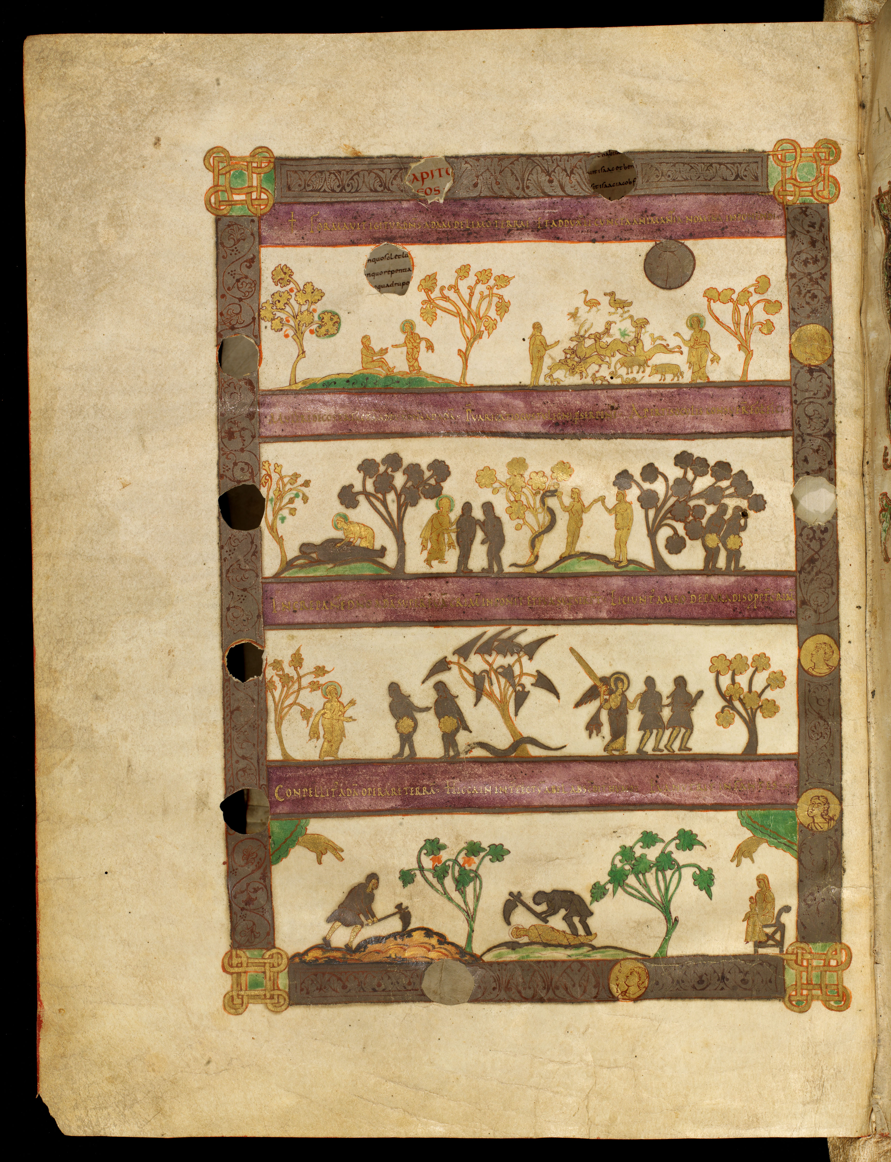 Alkuin-Bibel, Bamberg, Miniatur zum Alten Testament